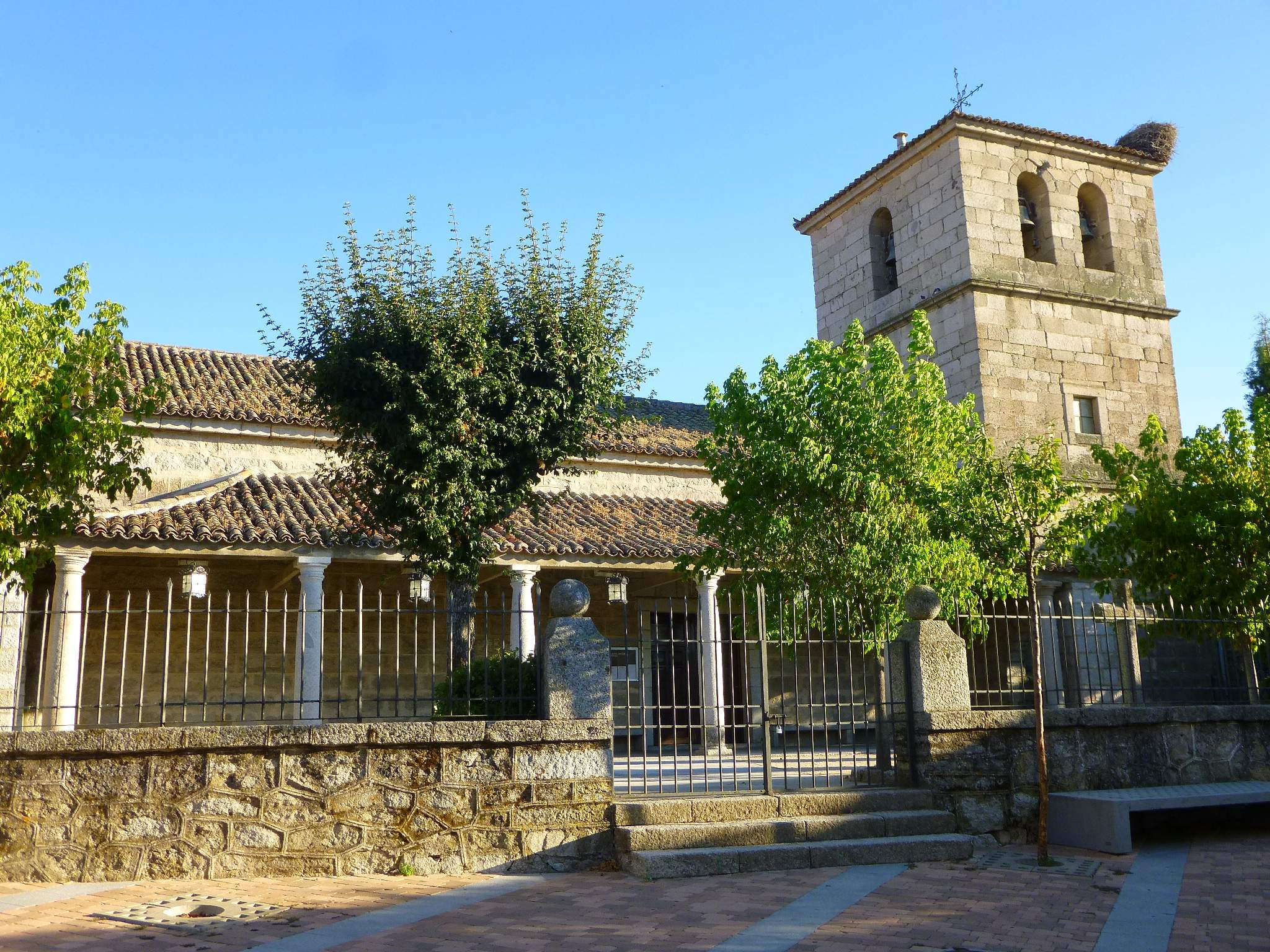 Iglesia de Nuestra Señora del Enebral (Collado Villalba, Madrid)